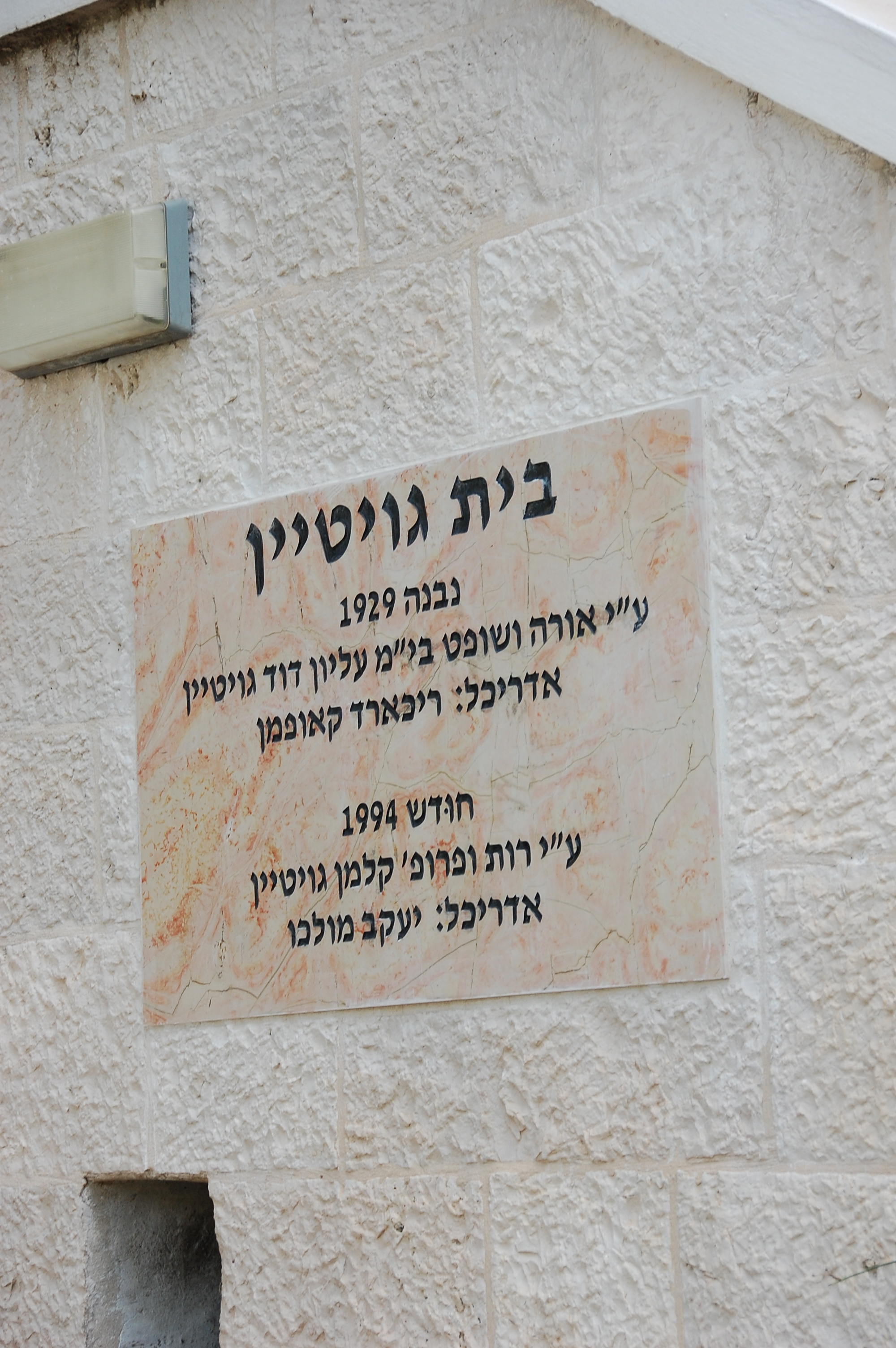 שלט על בית גויטיין, רחביה